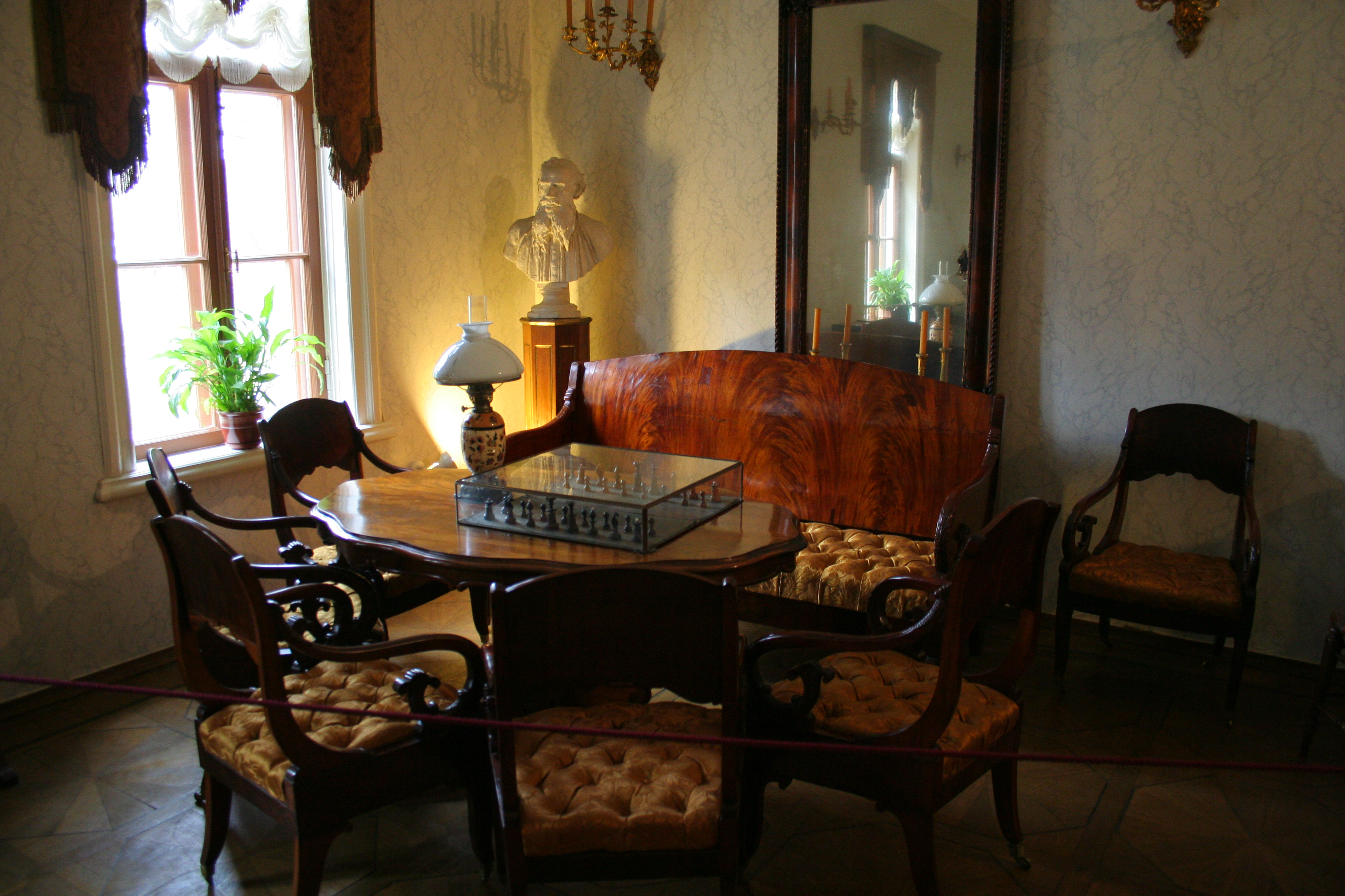 Мемориальный музей-усадьба Л. Н. Толстого «Хамовники». Внутренние виды.